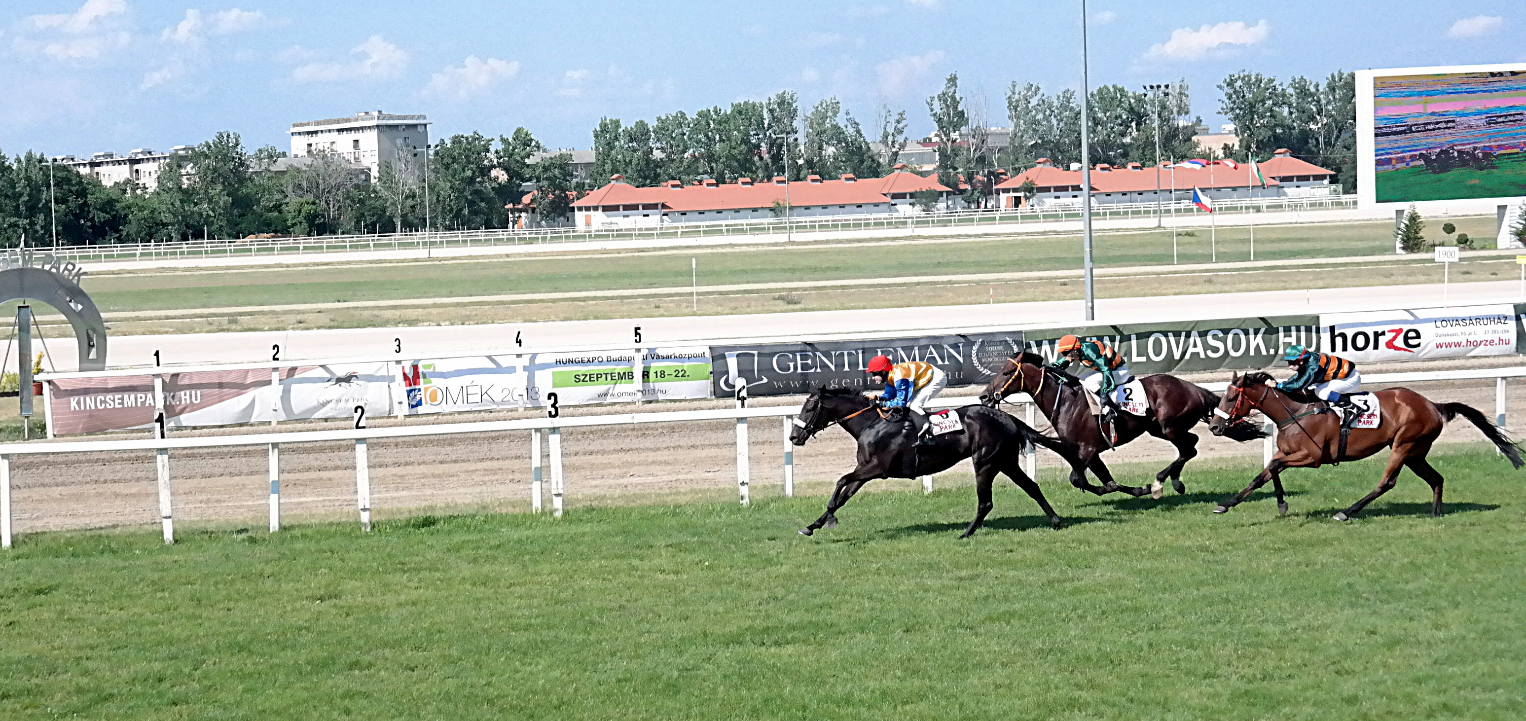 2013-as derby: cél előtt az V. futam első három helyezettje (Yucca, Ypsilon King, Quissisana). Kincsem Park.